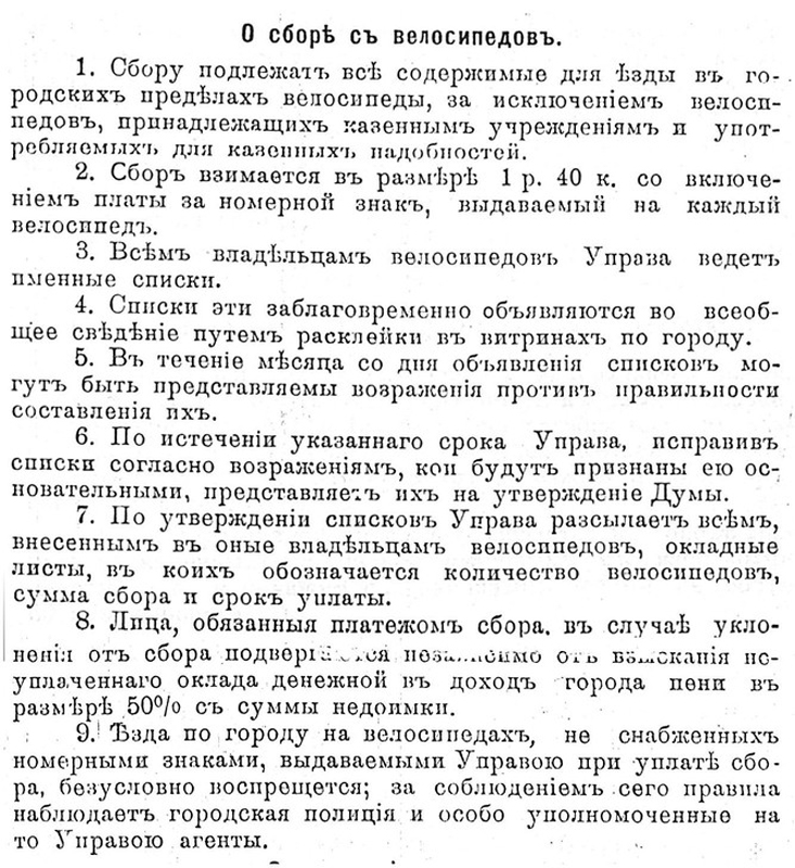 О сборе с велосипедов 1. Сбору подлежат все содержимые для езды в городских пределах велосипеды, за исключением велосипедов, принадлежащих казенным учреждениям и употребляемых для казенных надобностей. 2. Сбор взимается в размере 1 р. 40 к. с включением платы за номерной знак, выдаваемый на каждый велосипед. Всем владельцам велосипедов Управа ведет именные списки. 3. Всем владельцам велосипедов Управа ведет именные списки. 4. Списки эти заблаговременно объявляются во всеобщее сведение путем расклейки в витринах по городу. 5. В течении месяца со для объявления списков могут быть представленны возражения против правильности составления этих списков. 6. По истечении указанного срока Управа, исправив списки согласно возражениям, кои будут признаны ею основательными, представляет их на утверждение Думы. 7. По утверждении списков Управа разсылает всем, внесенным в оные владельцам велосипедов, окладные листы, в коих обозначается количество велосипедов, сумма сбора и срок уплаты. 8. Лица, обязанные платежом сбора, в случае уклонения от сбора подвергаются пени в размере 50% от суммы недоимки. 9. Езда по городу на велосипедах, не снабженных номерными знаками, выдаваемыми Управою при уплате сбора, безусловно воспрещается; за соблюдением сего правила наблюдает городская полиция и особо уполномоченные на то Управою агенты.